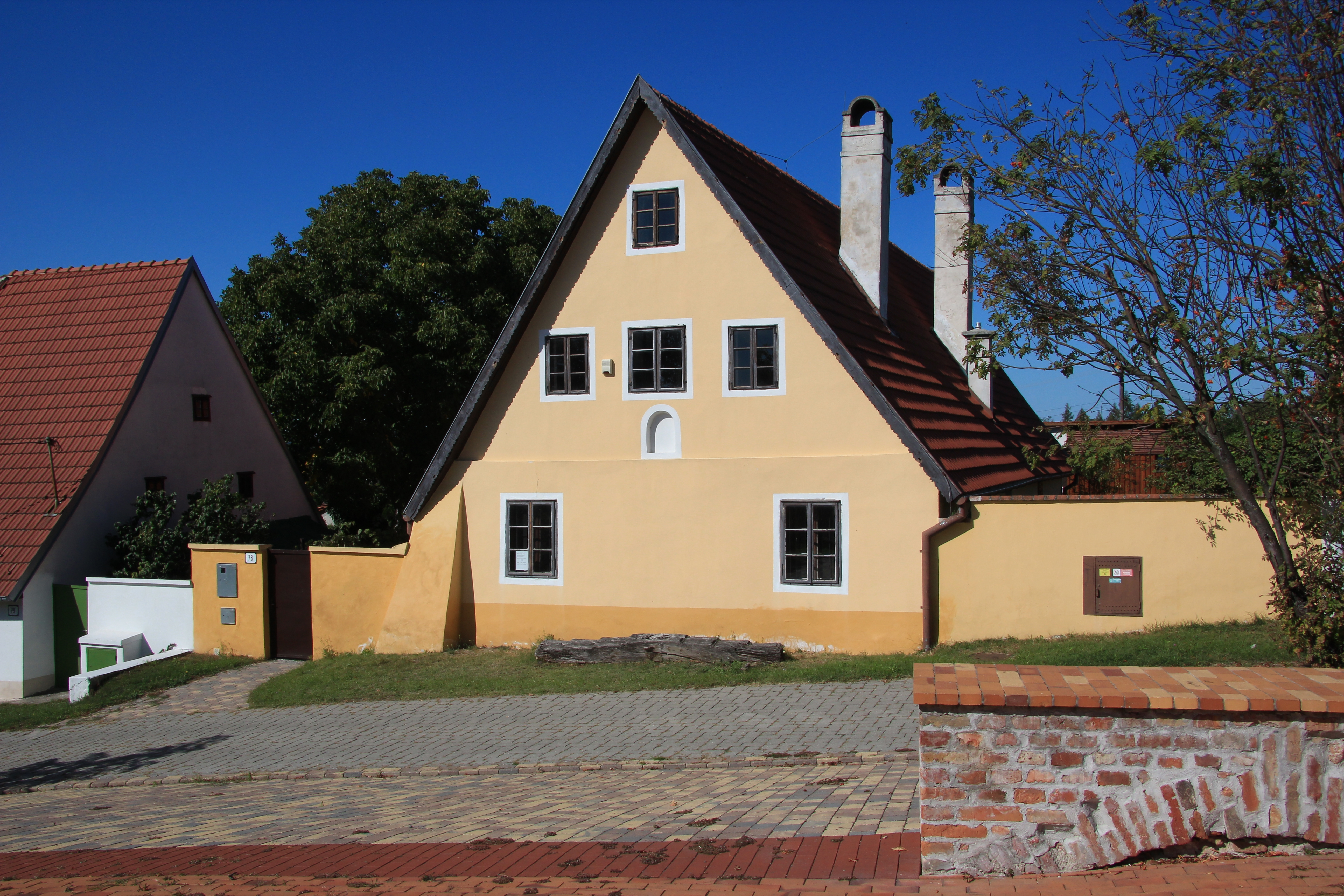 Habaner Haus in Veľké Leváre mit Hausnr. 78